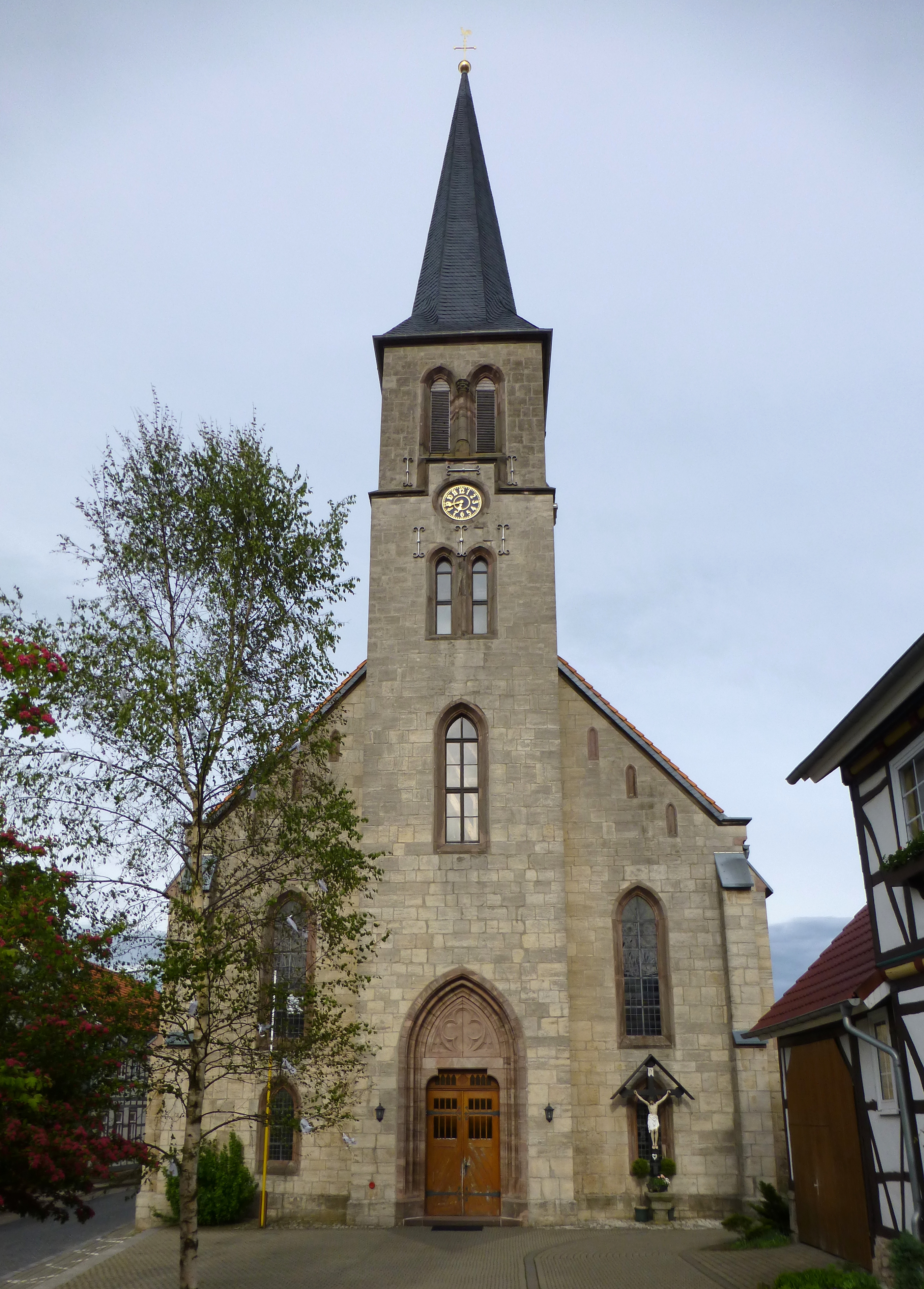 Katholische Kirche St. Pankratius in Beuren, Landkreis Eichsfeld, Thüringen. Erbaut 1870-73